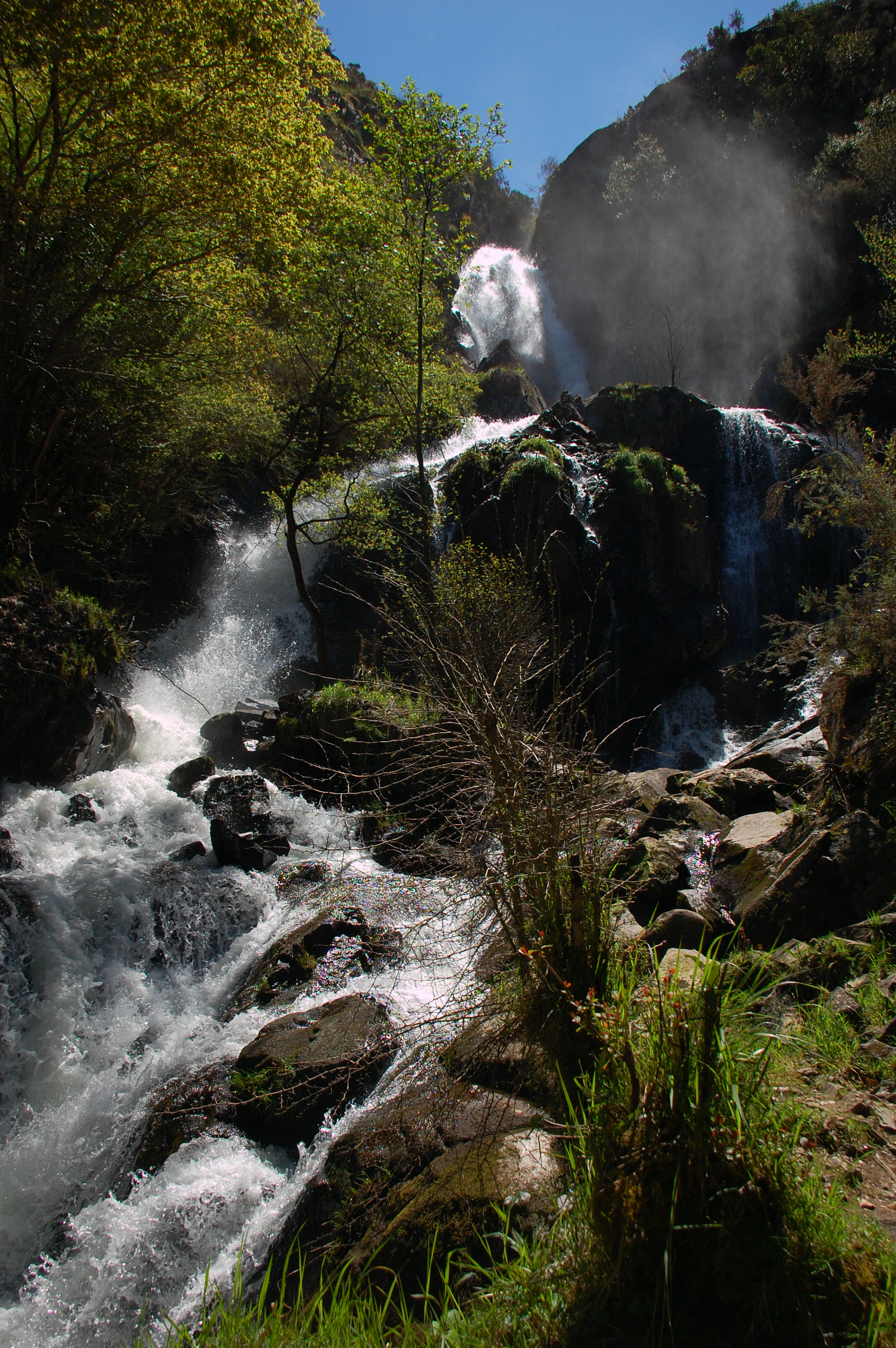 Fervenza de Sampaio no río Outón, afluente do río Grande, na parroquia de Entrecruces, Carballo (A Coruña). O camiño forma parte dunha derivación da PR-G 142 Ruta das Férvedas.